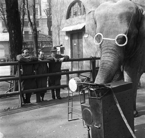 Milano - Giardini pubblici. Alfonso Gatto, Oreste Del Buono e Vittorio Sereni - elefante con gli occhiali